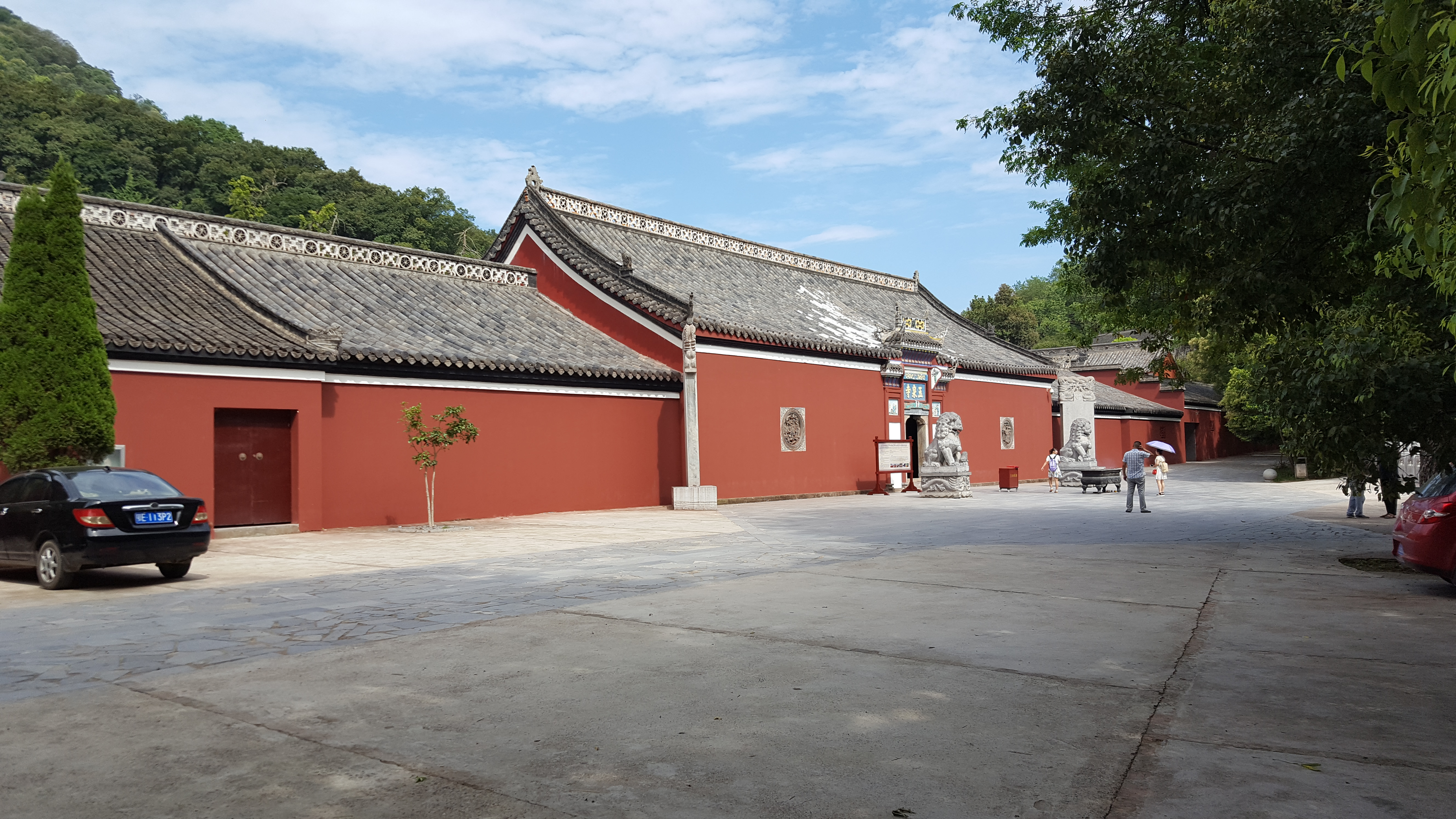 中文（中国大陆）: 当阳玉泉寺